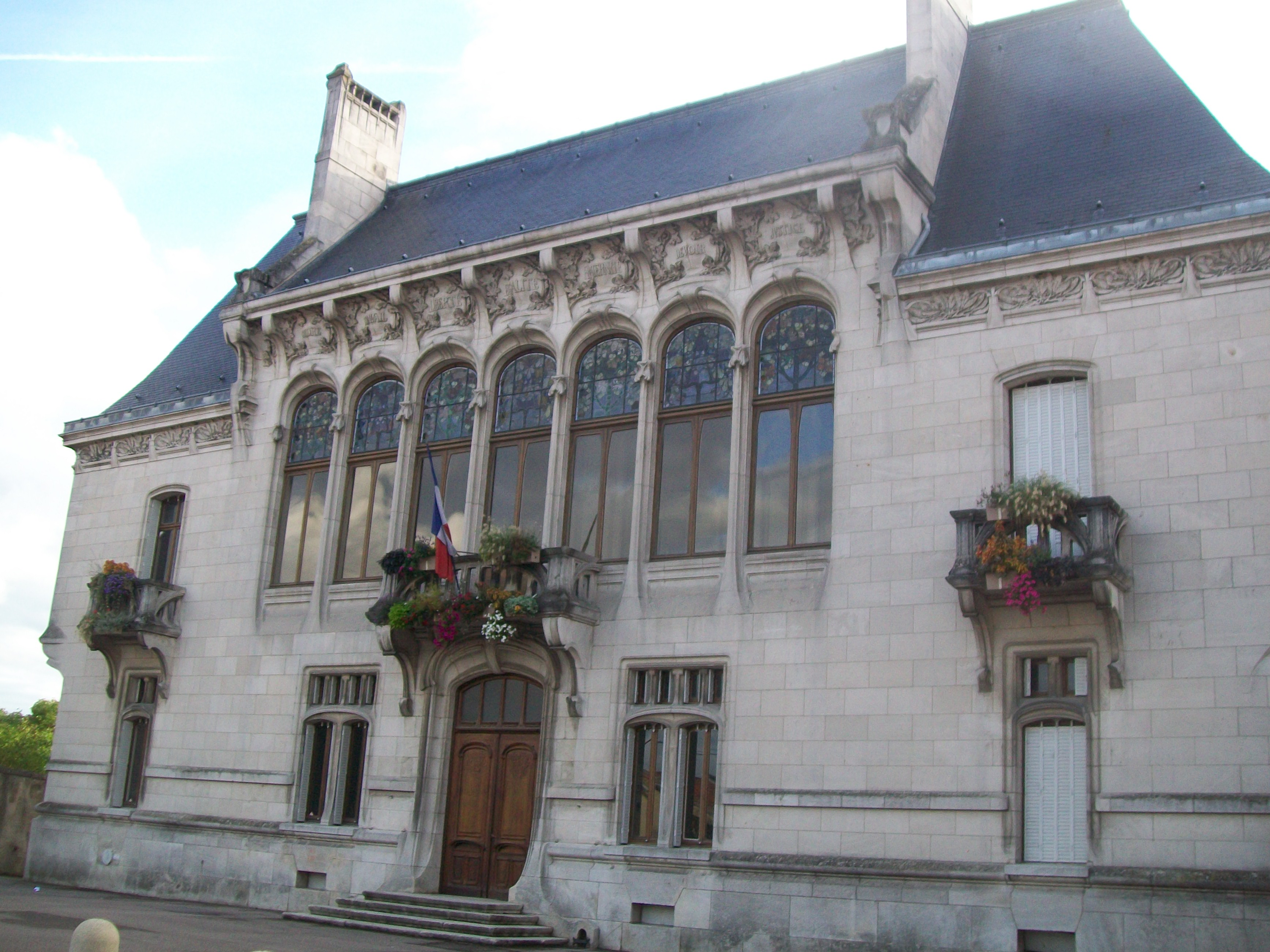 La pierre des carrières de la ville a fait sa richesse